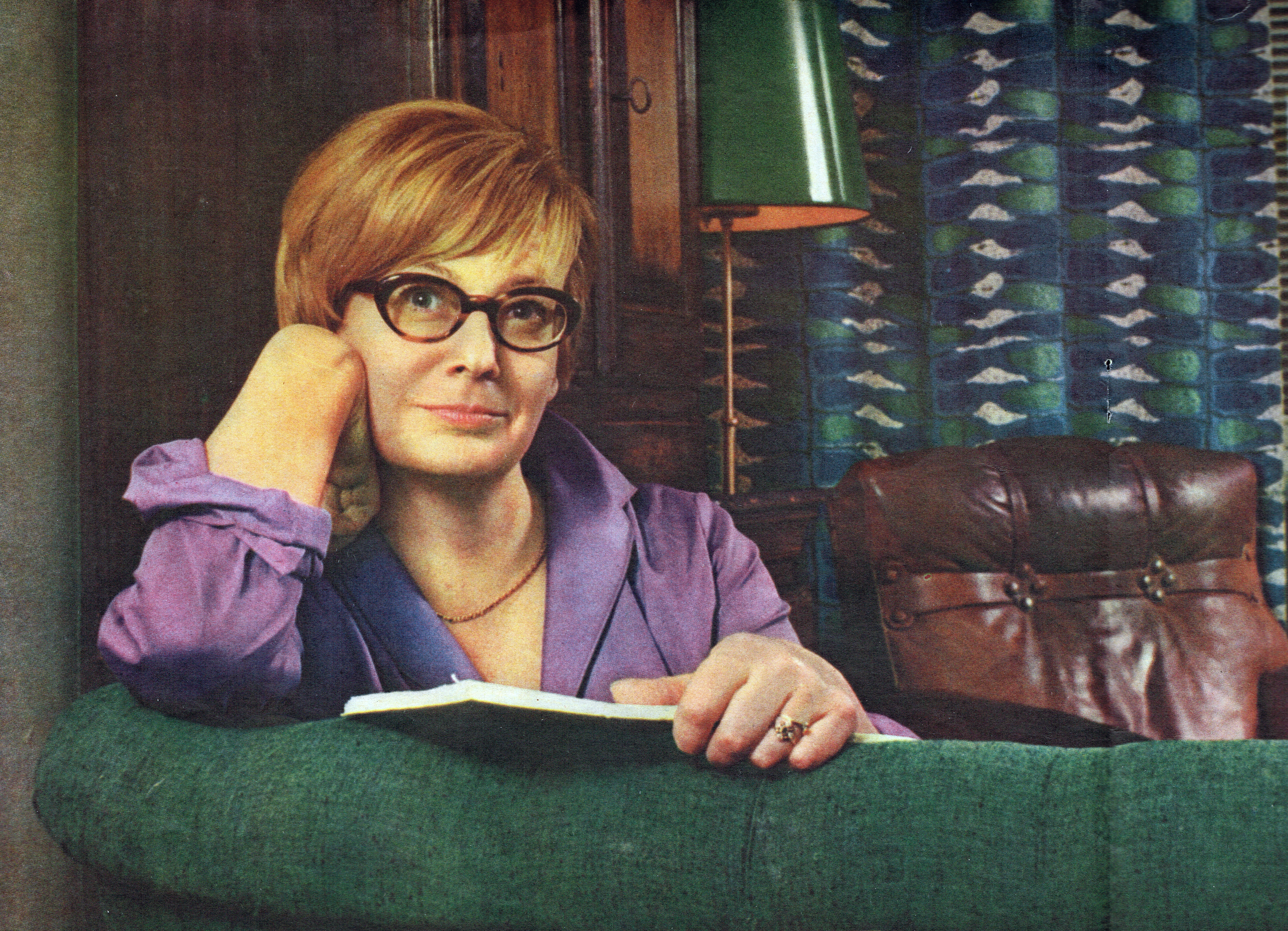 Marianne Stjernqvist.